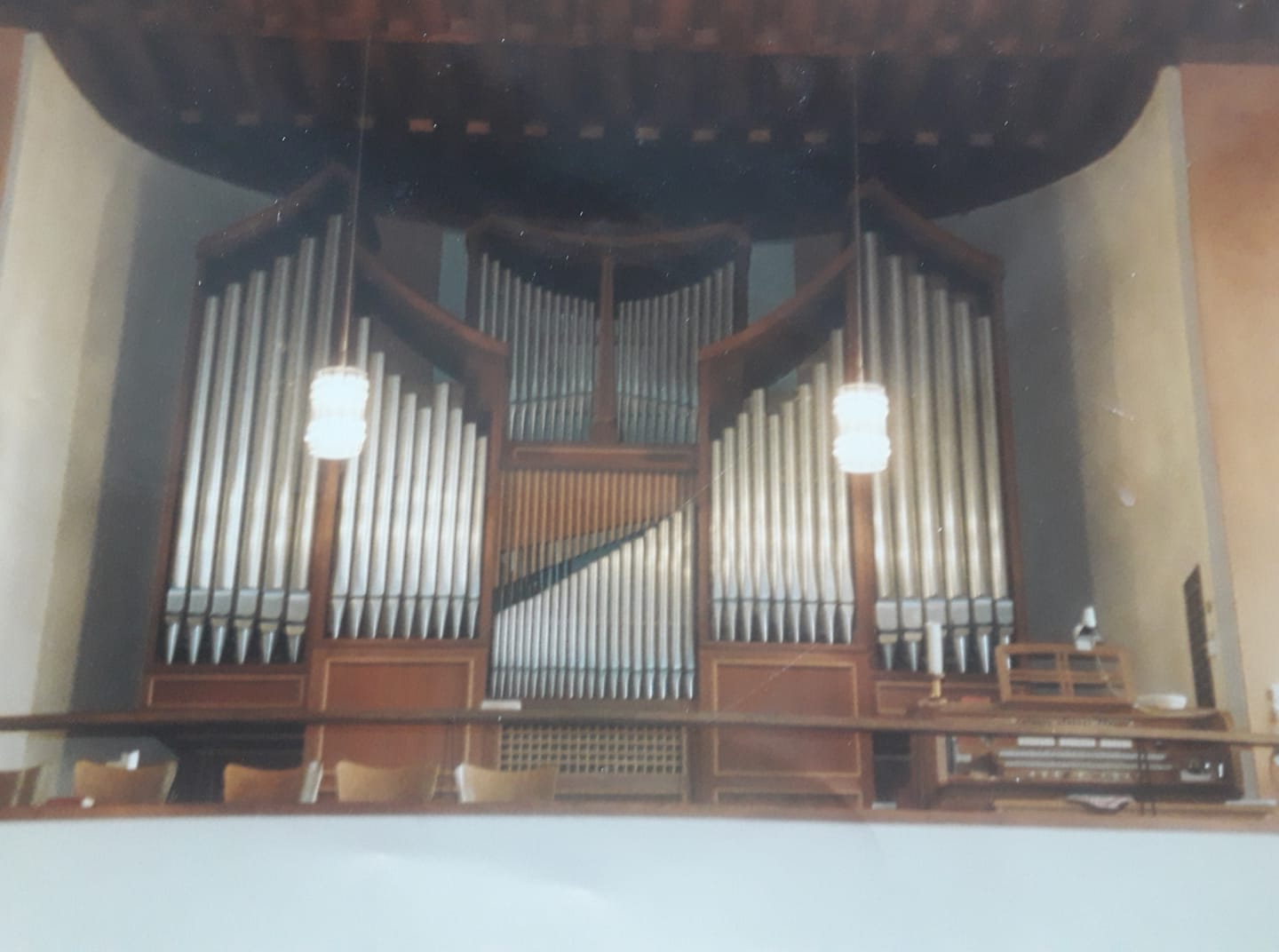 Heimbach Kirche Orgel